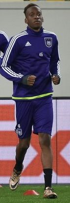 Доді Лукебакіо - футболіст Андерлехта